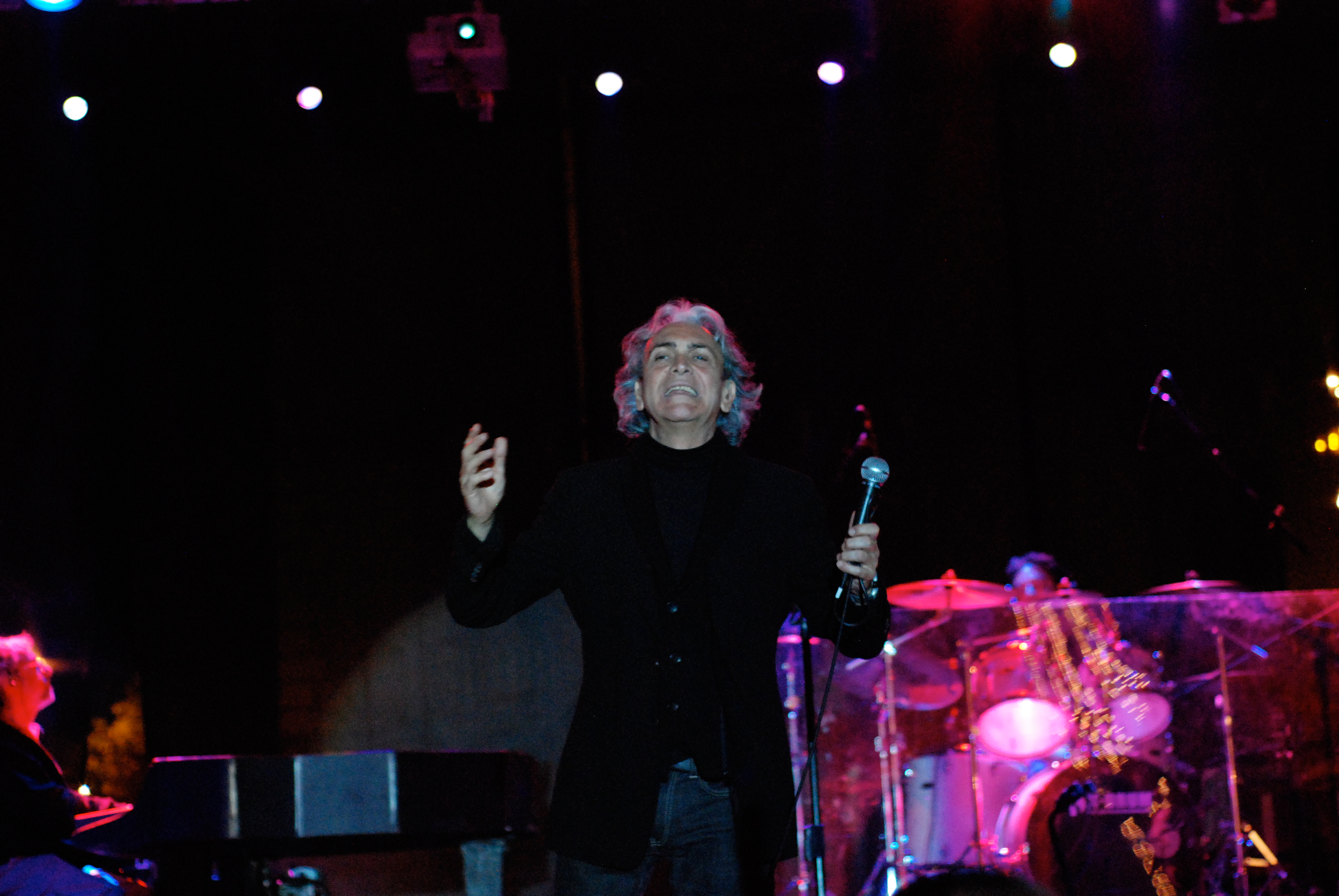 Il cantante italiano Riccardo Fogli in concerto, giugno 2009